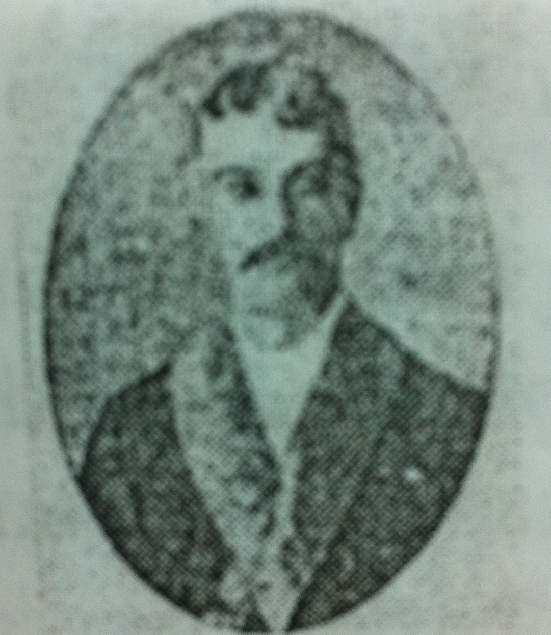 Abraham Lévy-Cohen (1844-1888), a Jewish-Moroccan lawyer and journalist, editor of "Le Reveil du Maroc" (Tangier), the first moroccan newspaper in French.